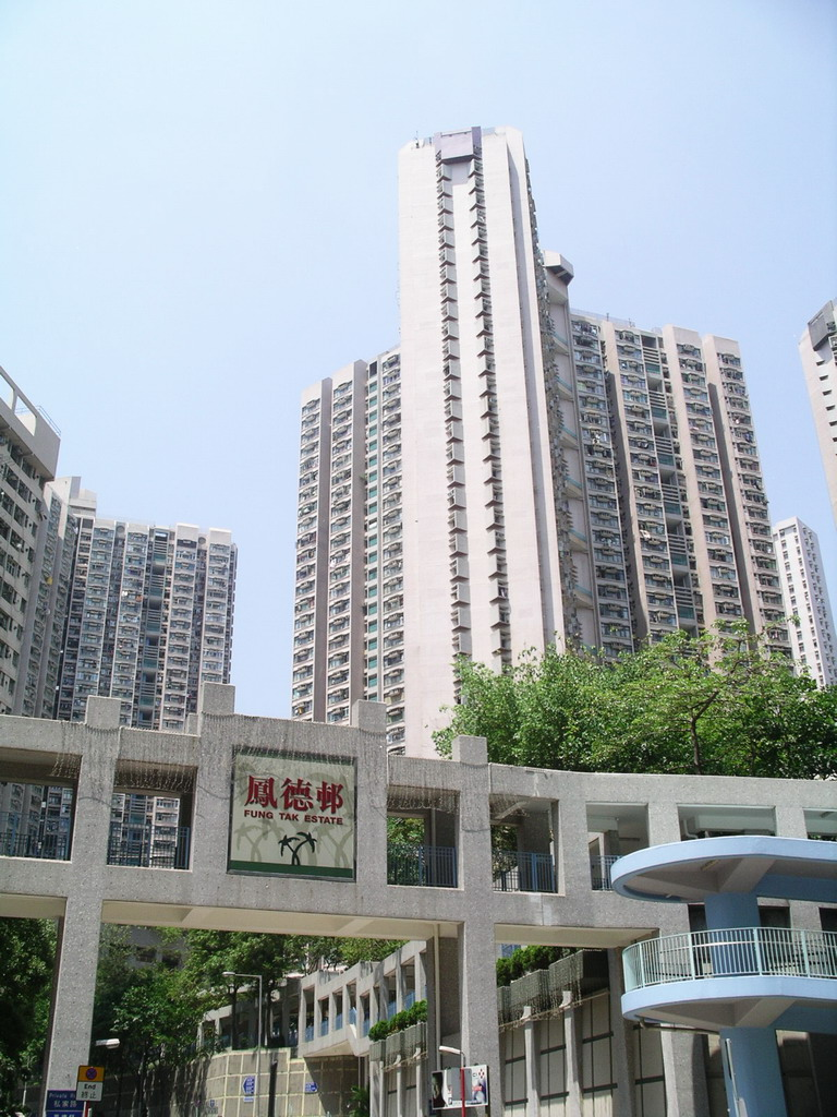 Fung Tak Estate, Kowloon, Hong Kong